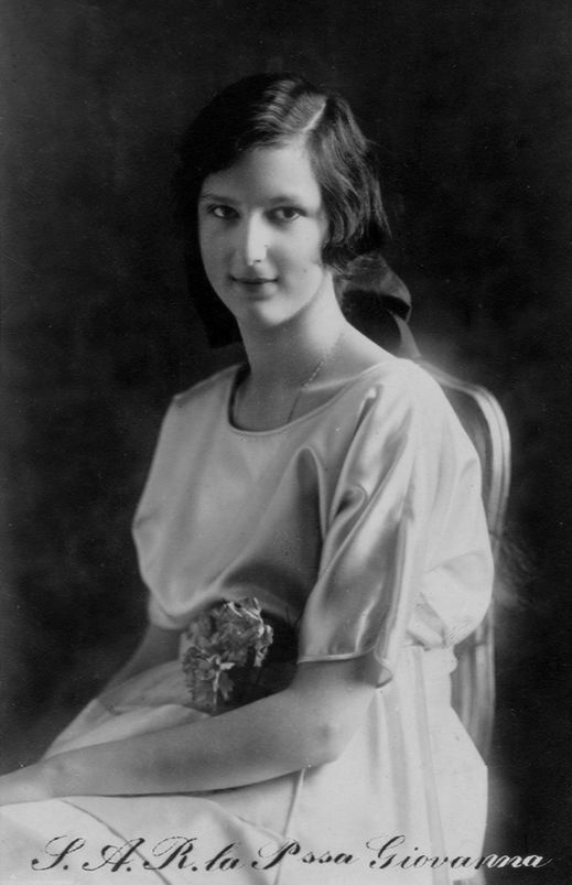 Ritratto della Principessa Giovanna d'Italia